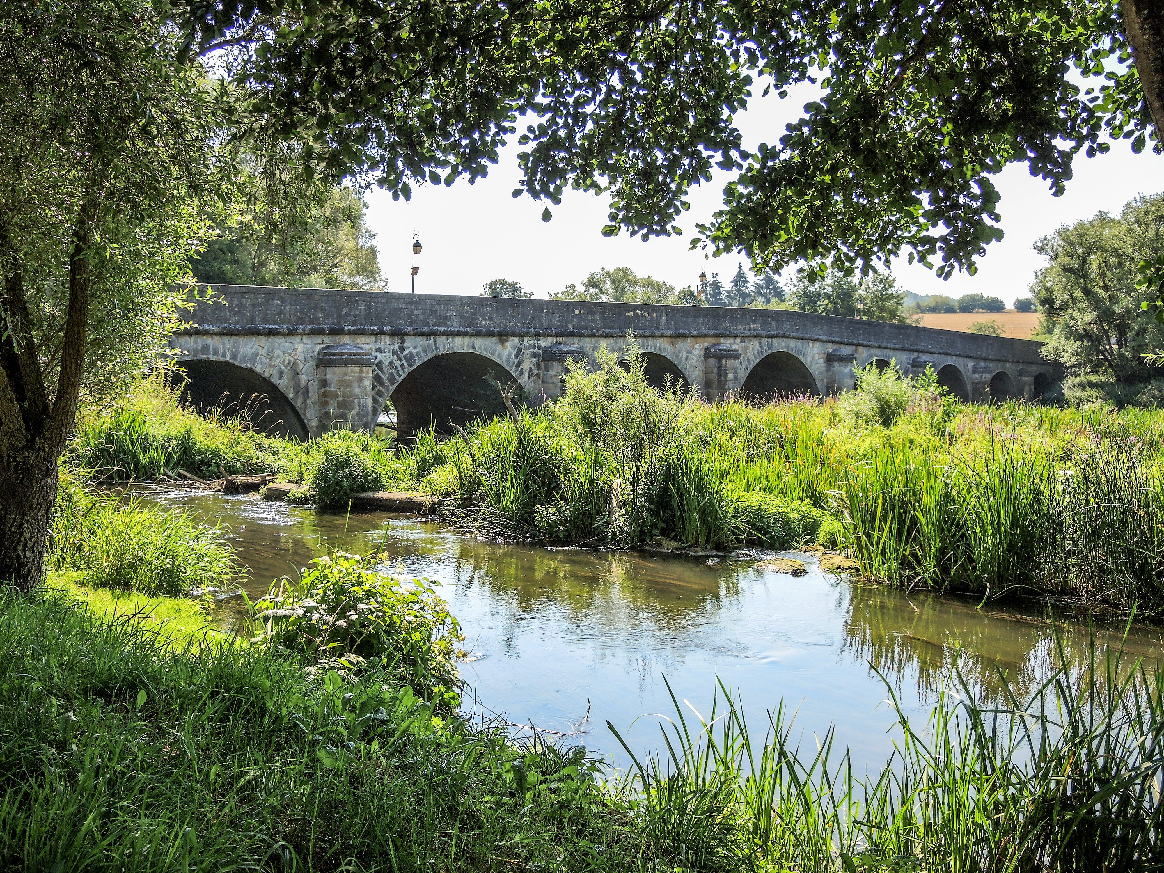 Pont sur le Madon. Xirocourt. Meurthe-et-Moselle